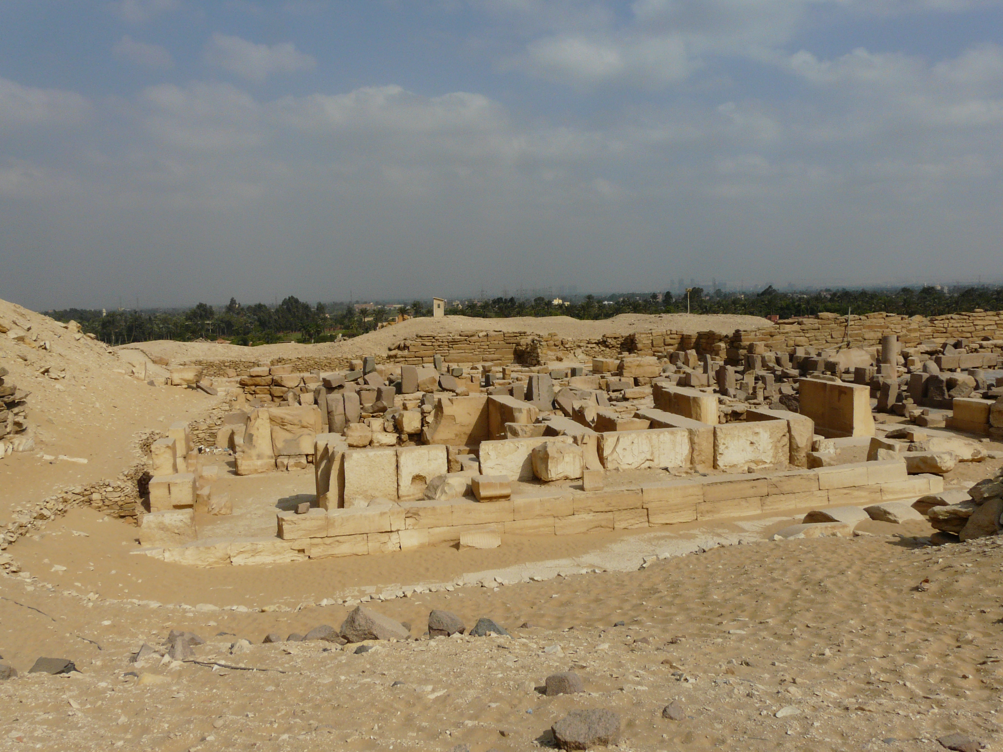 Complexe funéraire de Sahourê (Ve dynastie): vue générale du temple, partie ouest - Site d'Abousir